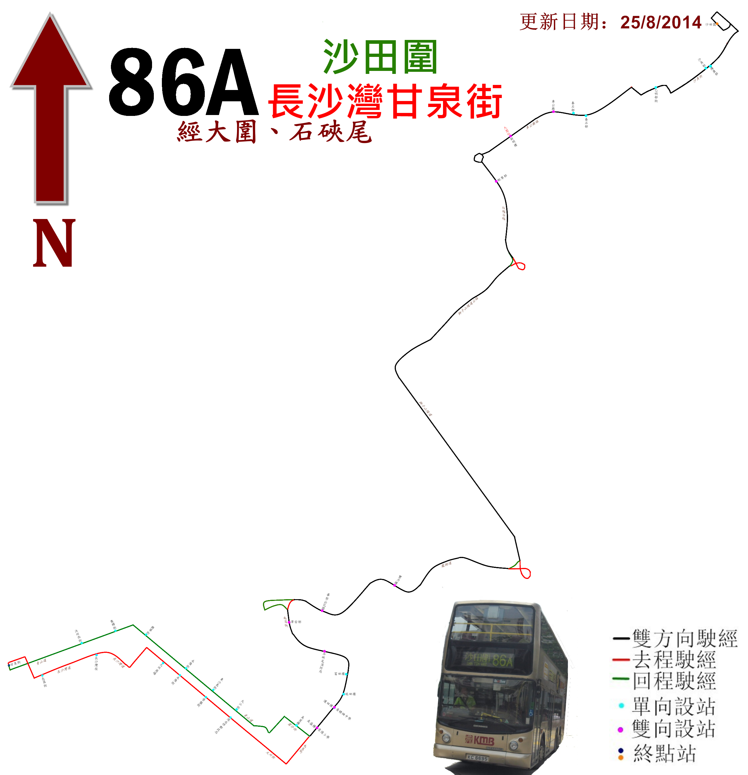 中文（香港）: 九巴86A線的走線圖